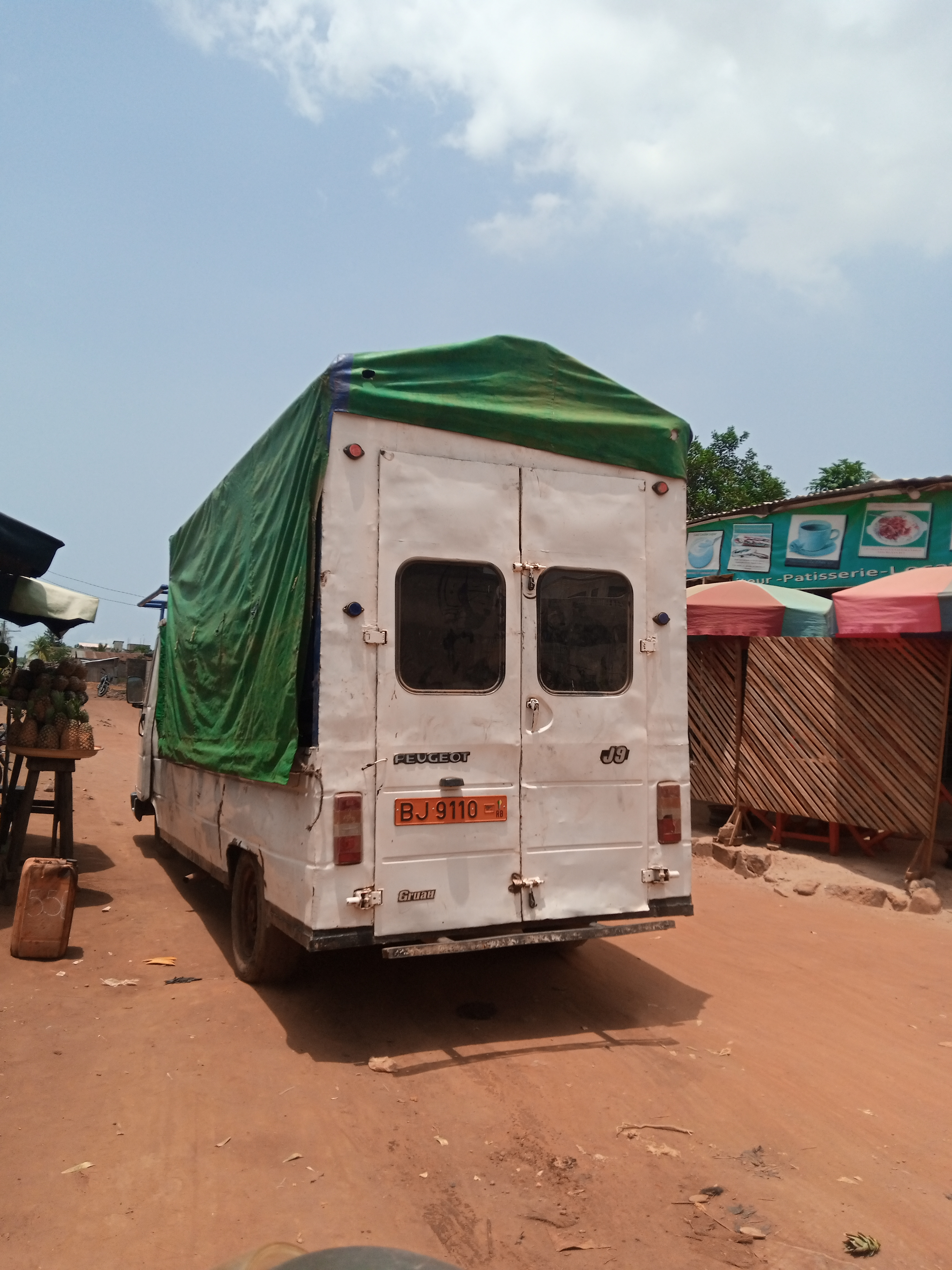 le transport à Abomey-Calavi This is an image with the theme "Africa on the Move or Transport" from: Benin